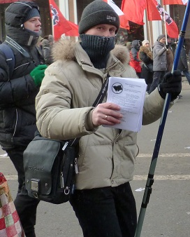 Активист из российской секции М.С.А.